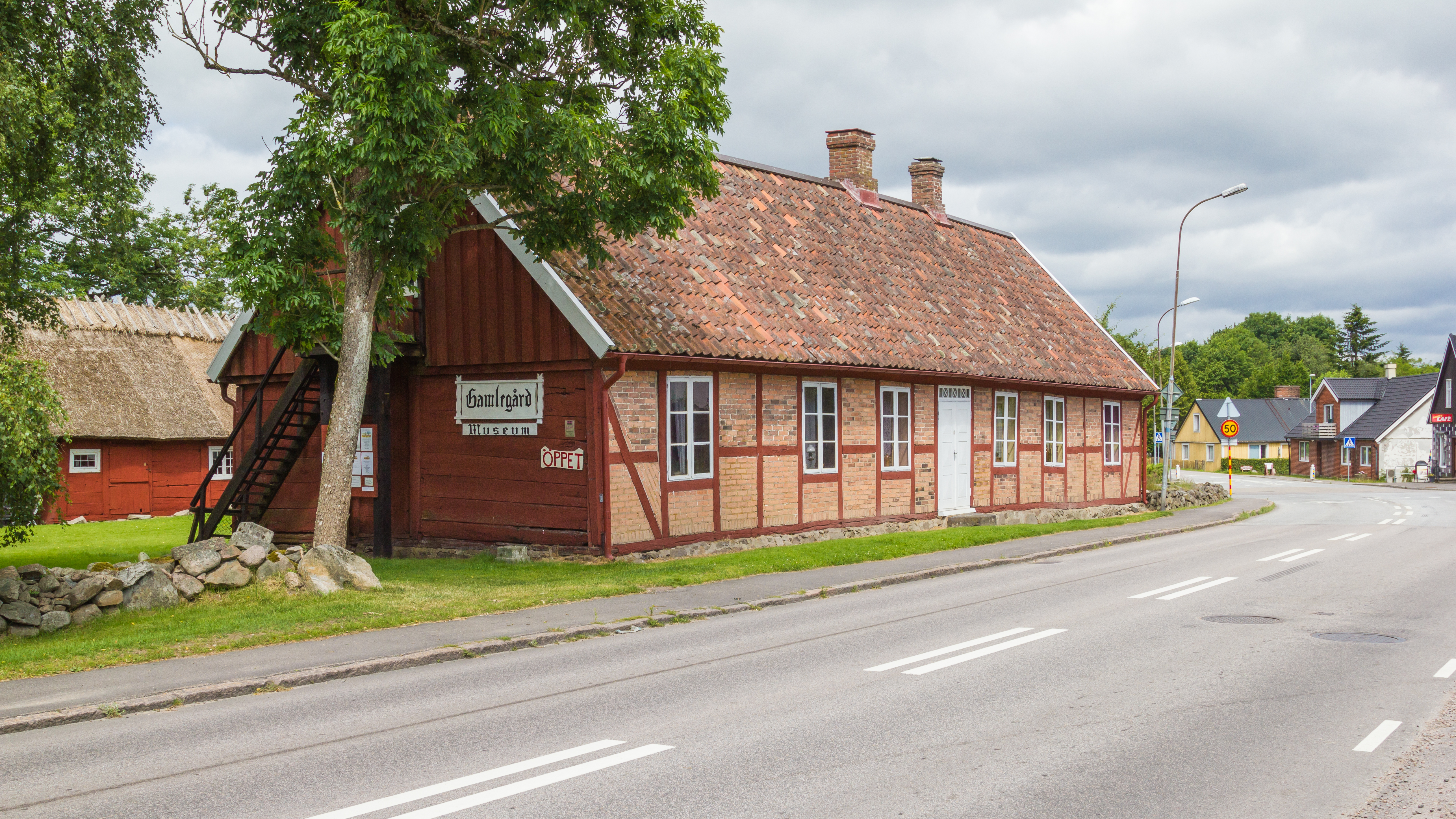 Gamlegård i Billinge. Billinge, Eslövs kommun, Skåne län, Sverige